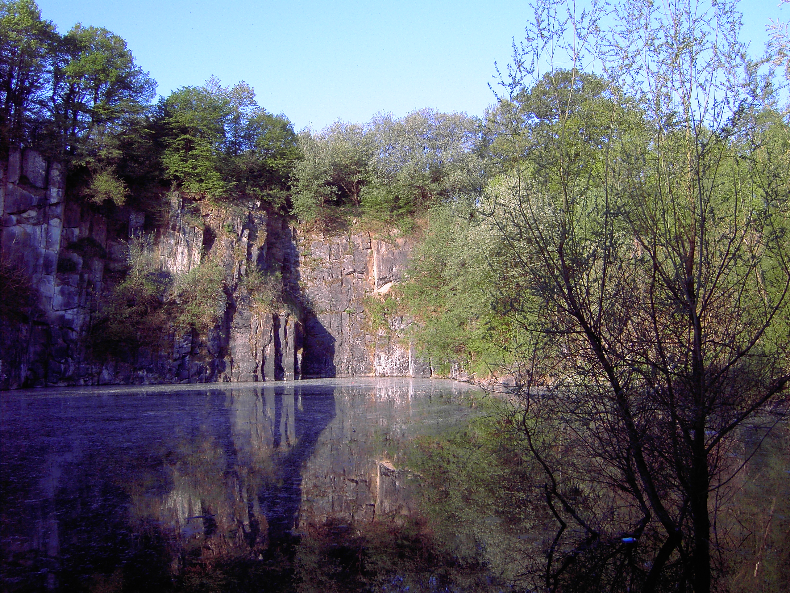 See in einem der Steinbrüche des NSG Schomet, Stolberg/Rhld.